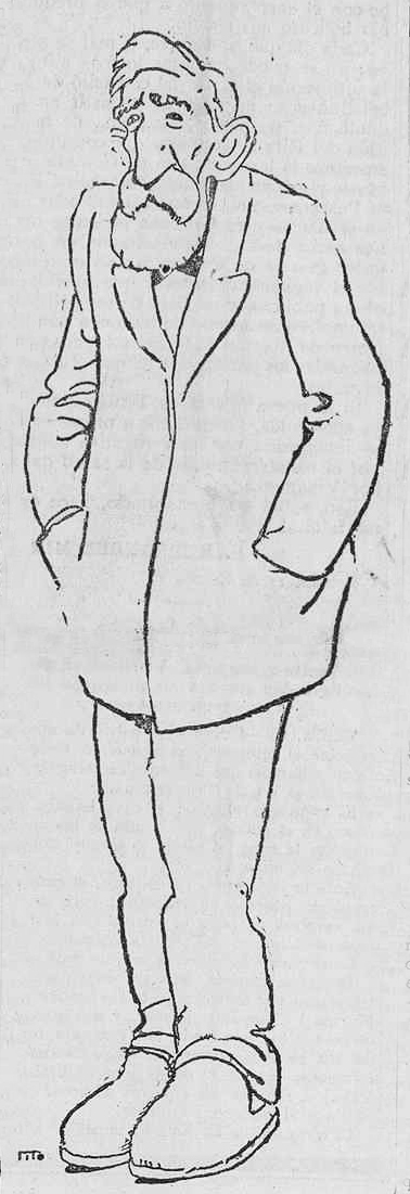 Tomás Bretón.